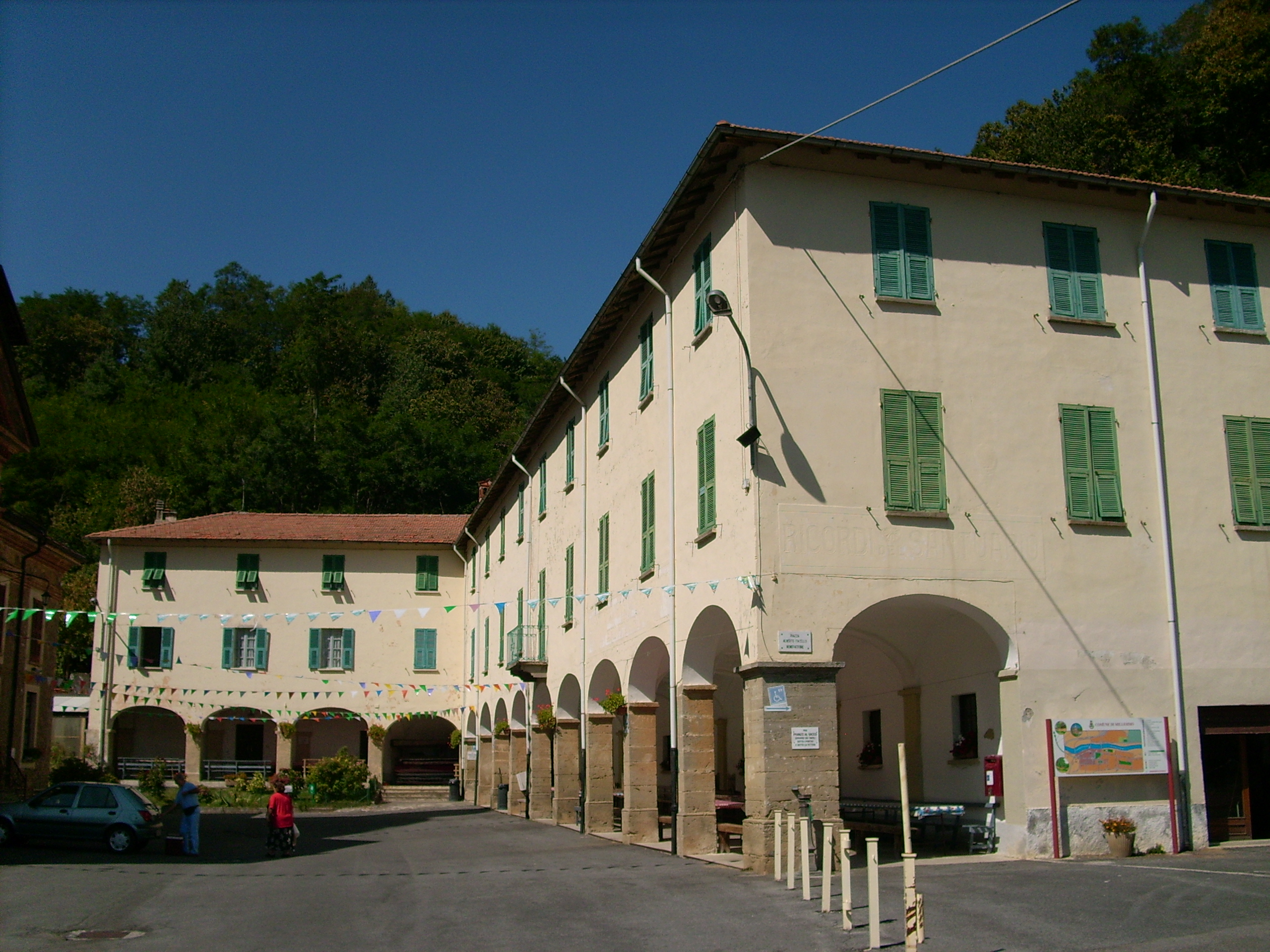 Santuario di Nostra Signora del Deserto di Millesimo, Liguria, Italia